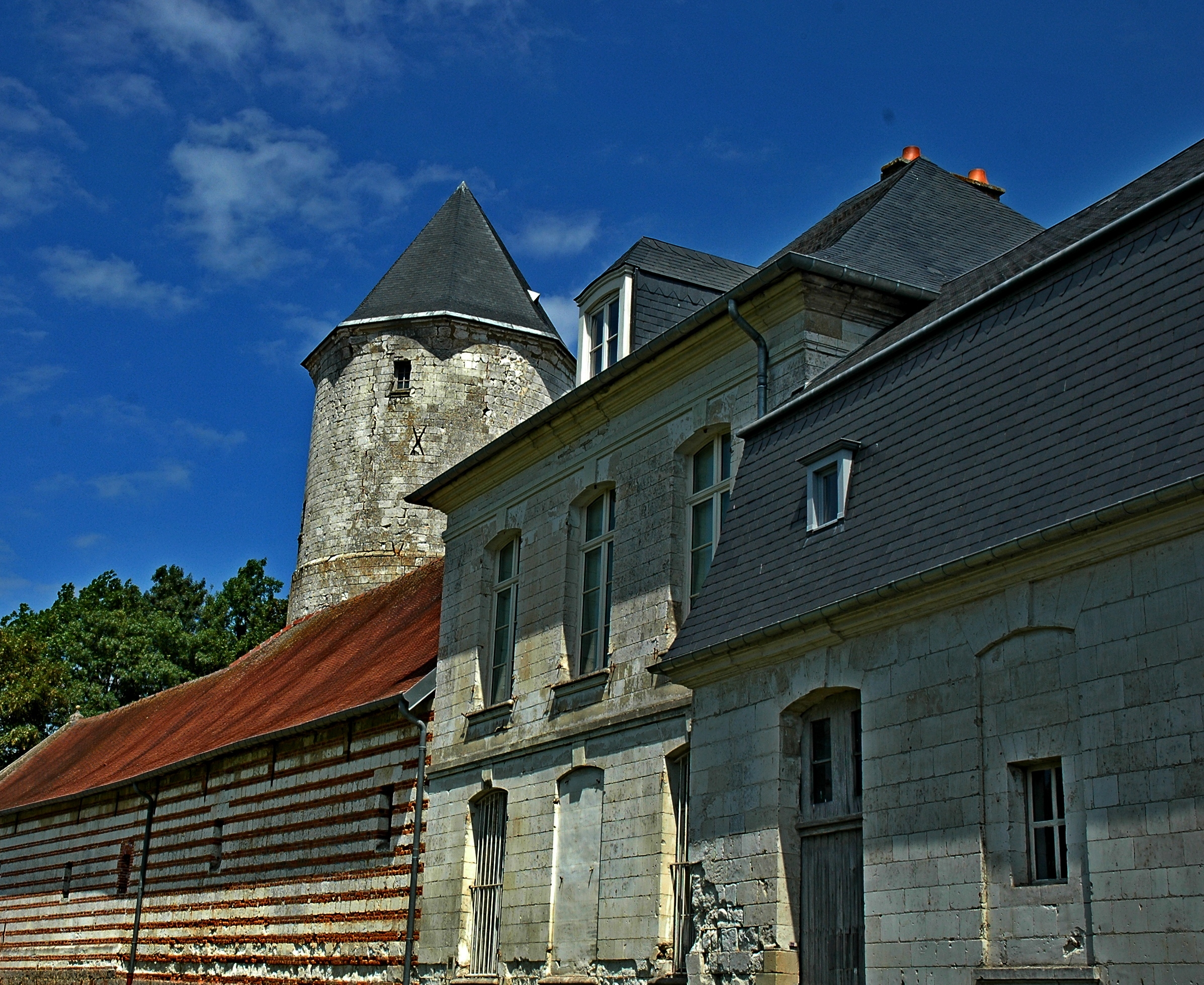 Flesselles (Somme, France). Le château.